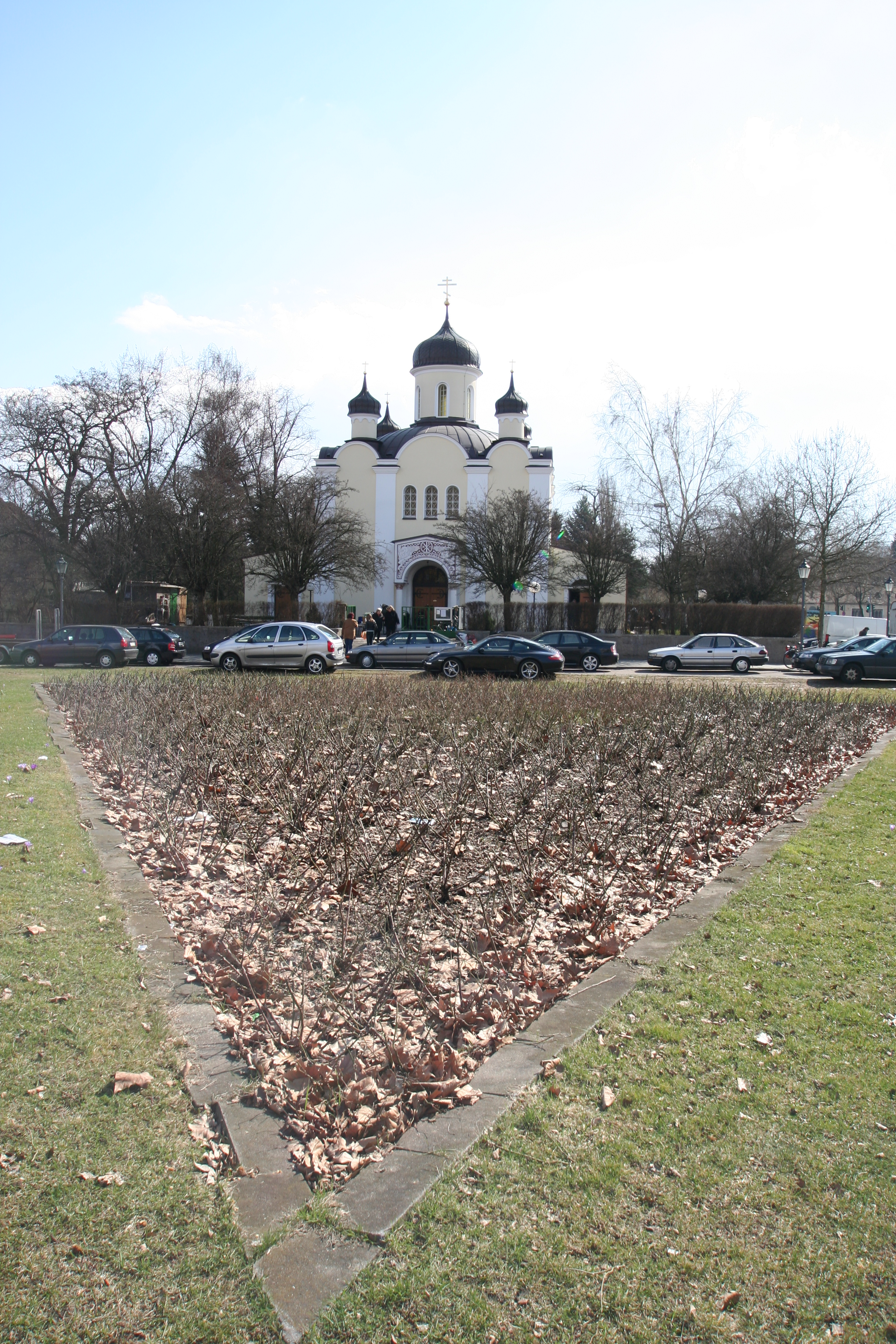 Christi-Auferstehungs-Kathedrale, Berlin, Germany